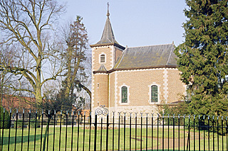 Chapelle de Saives